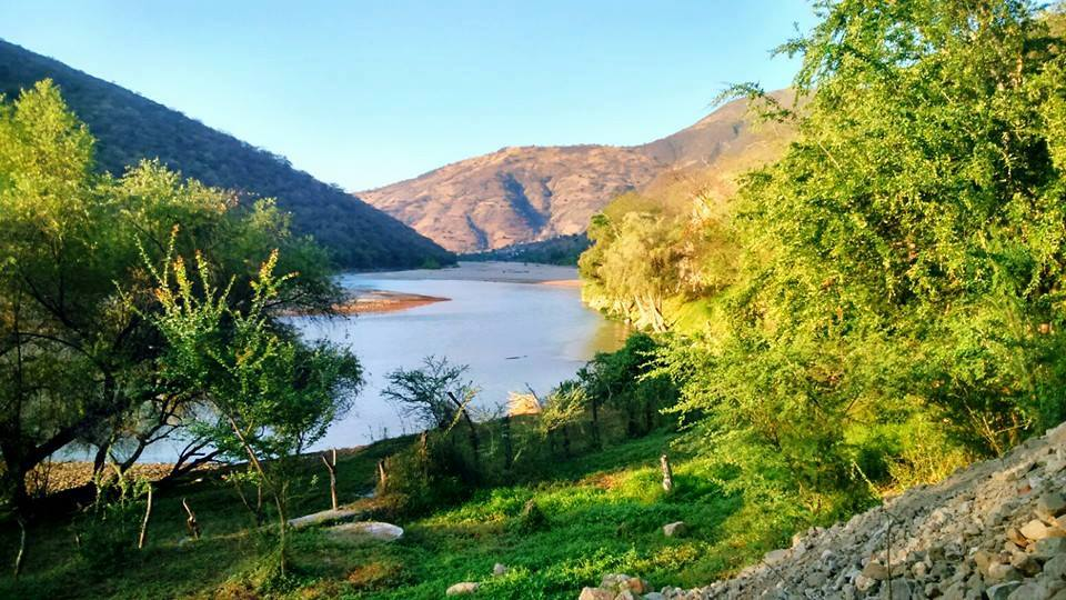 Rio Balsas a paso por Papalutla, a la orilla se encuentra el Balneario del mismo nombre